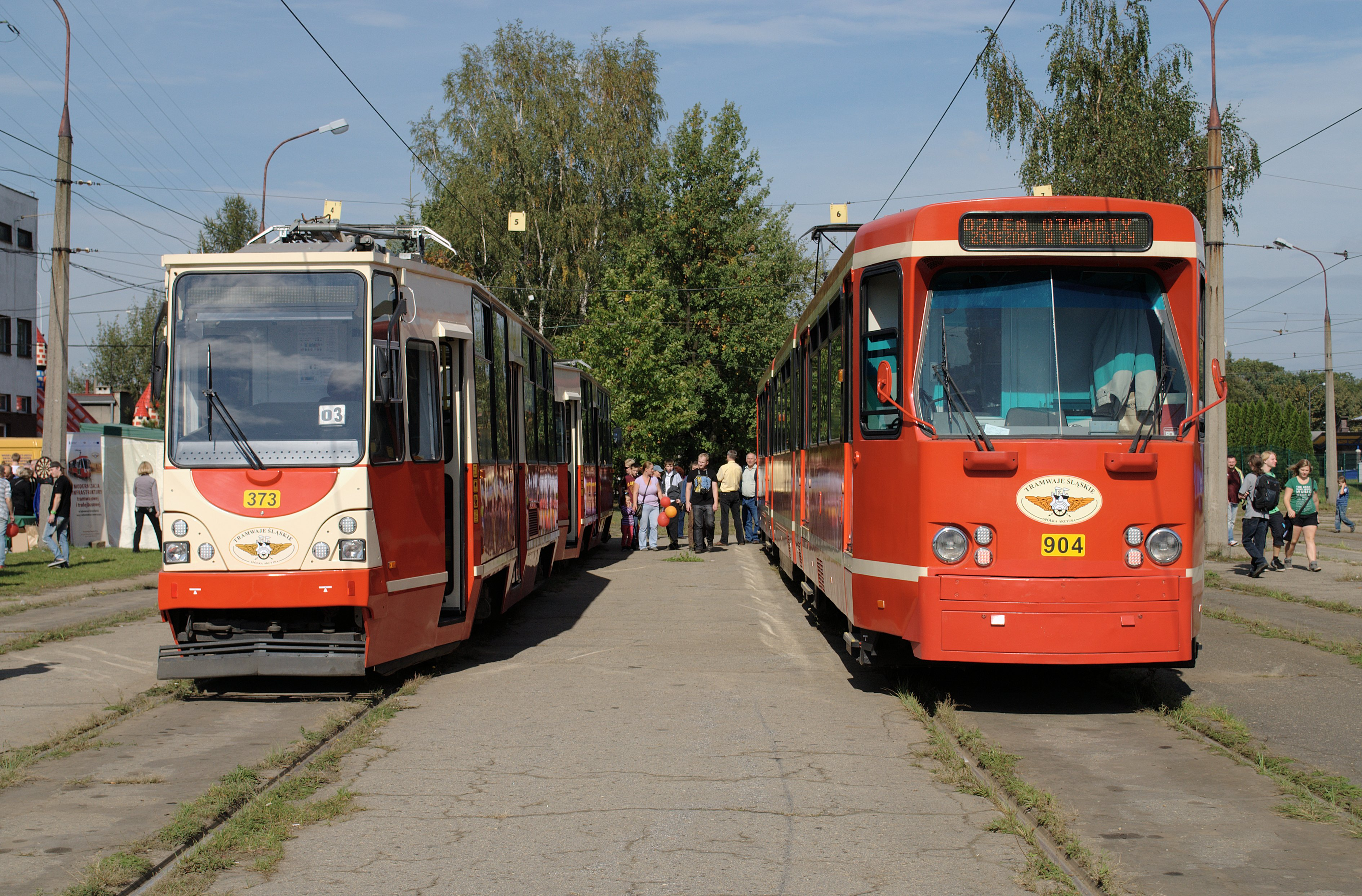 Konstal 111N 373 i Duewag Pt 904.